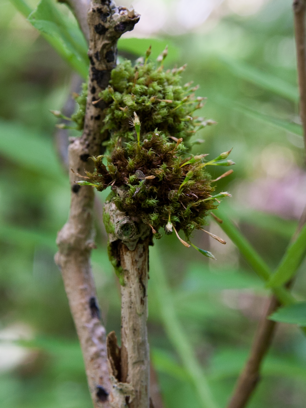 Krushättemossa